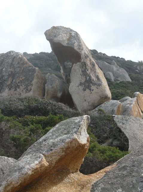 taffoni dans un granite